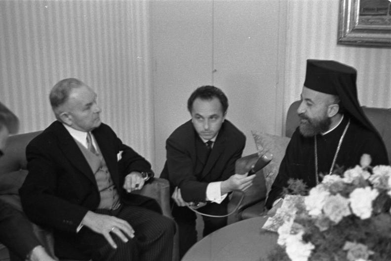 Staatsbesuch Zypern Besuch bei Ministerpräsident Ehard 26.-27.5.1962